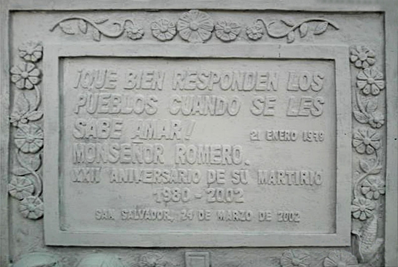 Foto del Monumento a Monseñor Oscar A. Romero en San Salvador, El Salvador